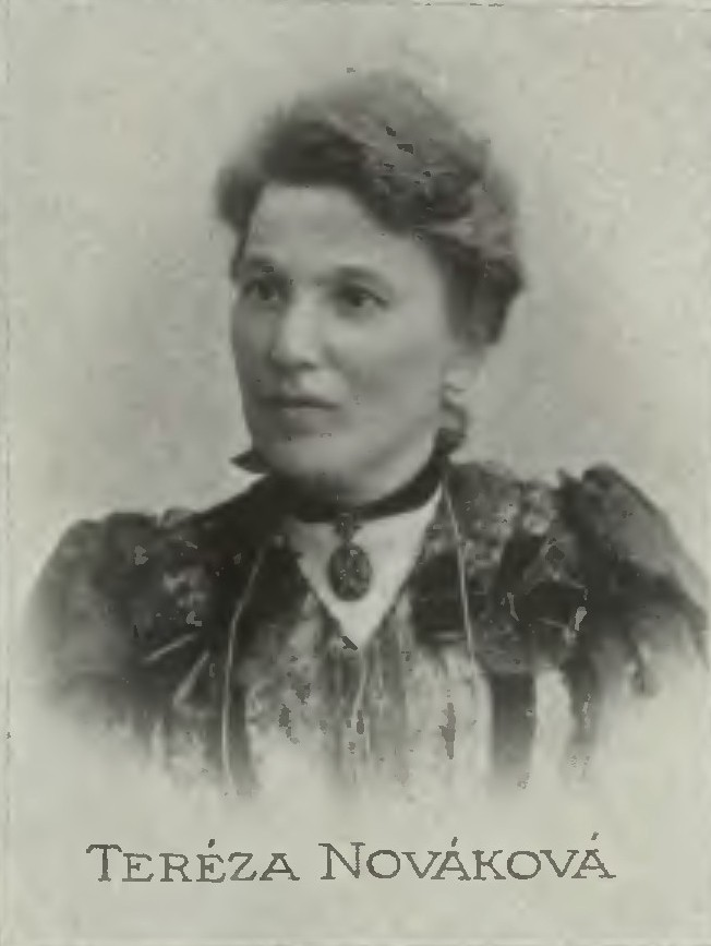 Portrét – Teréza Nováková (1853-1912), Česká spisovatelka